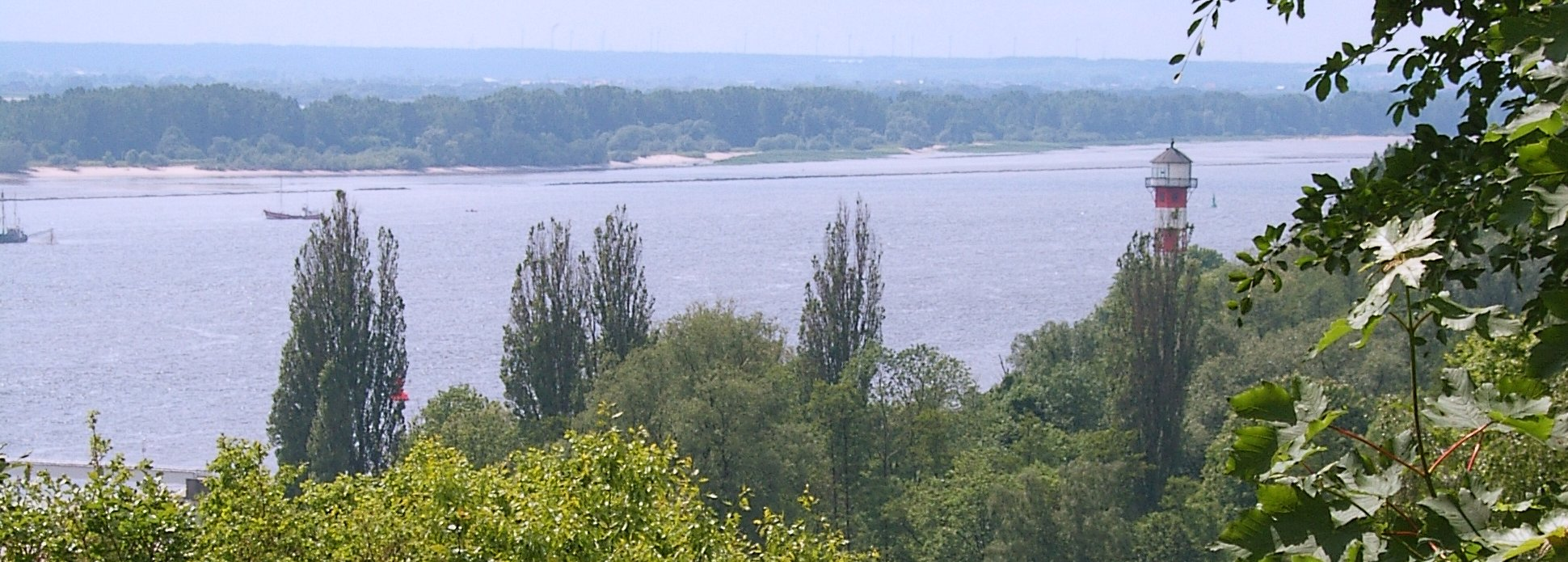 Hamburg, Rissen, Falkensteiner Ufer, Leuchtturm, Blick auf den Neßsand.